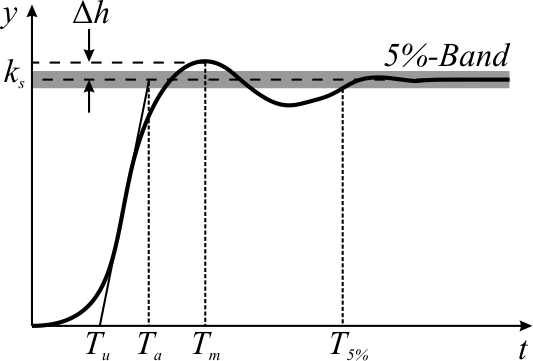 Stark gedämpfte Schwingung in der Nähe des aperiodischen Grenzfalls